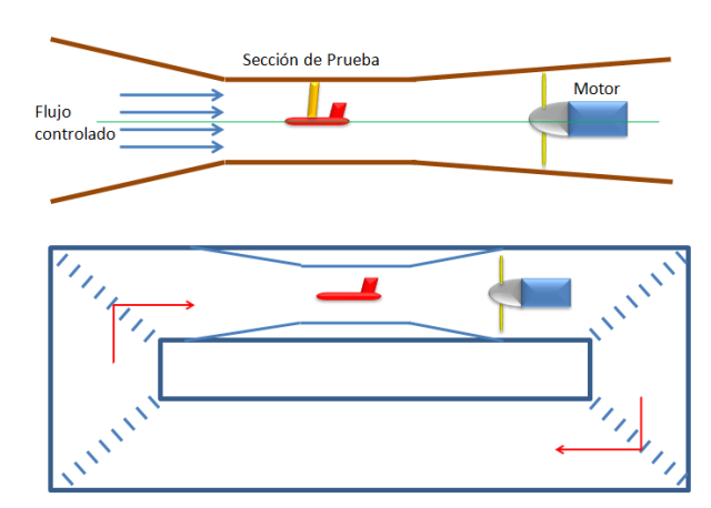 Tipo de túneles aerodinámicos de acuerdo a de donde toman el aire para las pruebas.